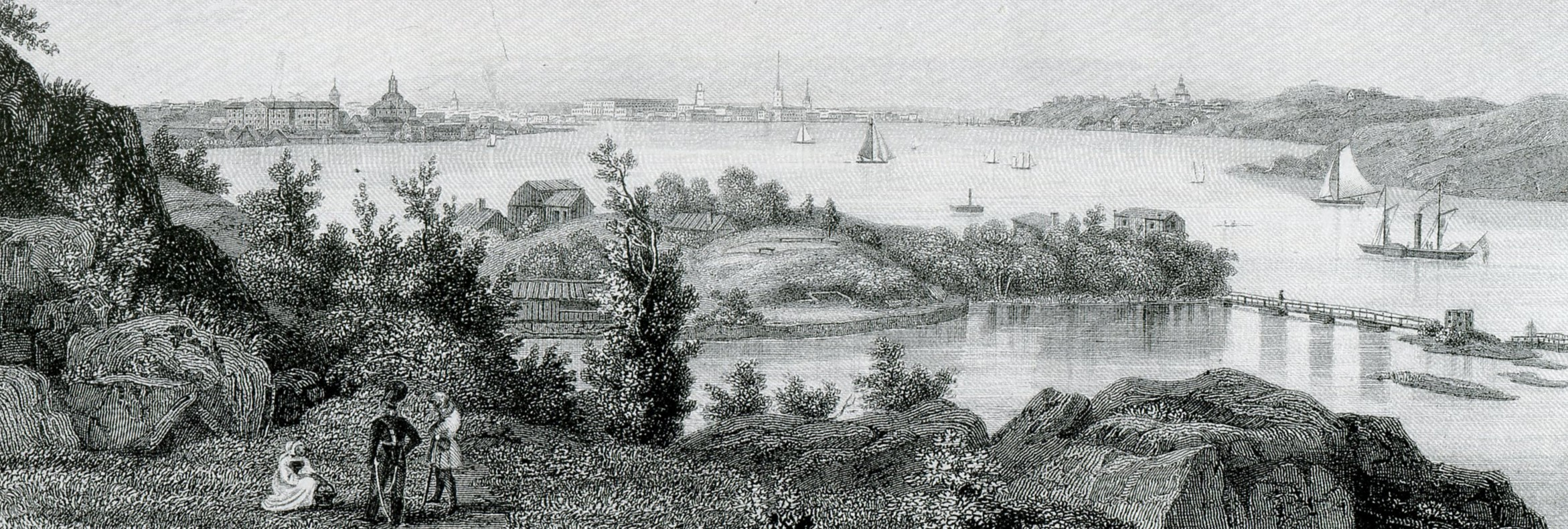 Vy från Kungsholmen över Stockholm, stålstick av Johan Poppel efter en teckning av C. Calmeyer